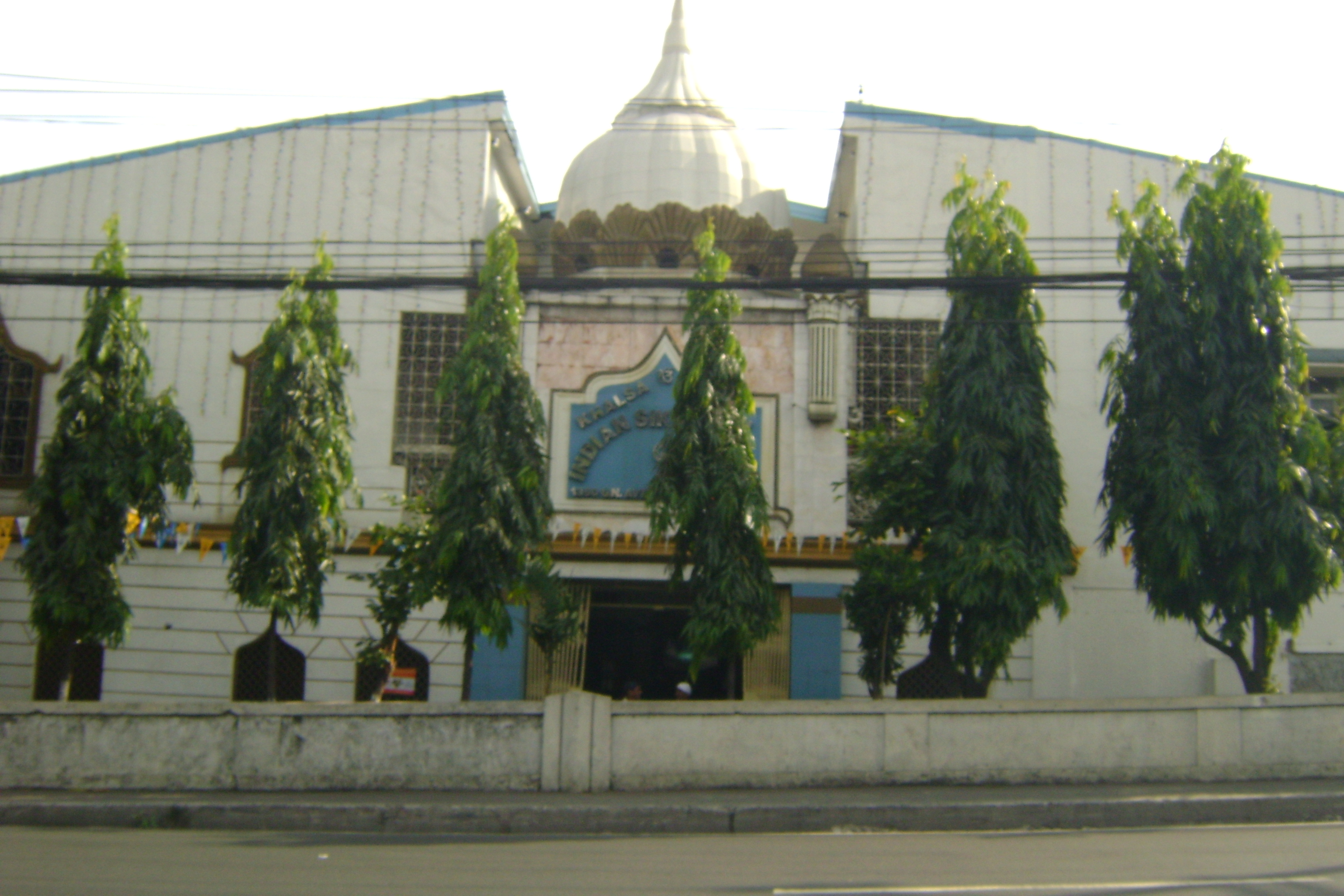 Manila Sikh Temple in Manila, Philippines